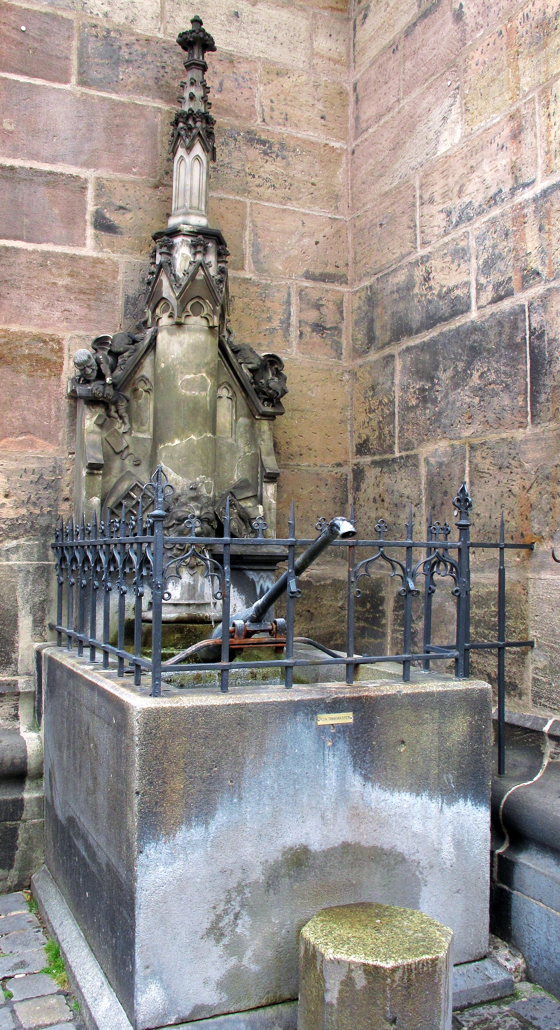 Teufelsbrünnlein Gesamtansicht